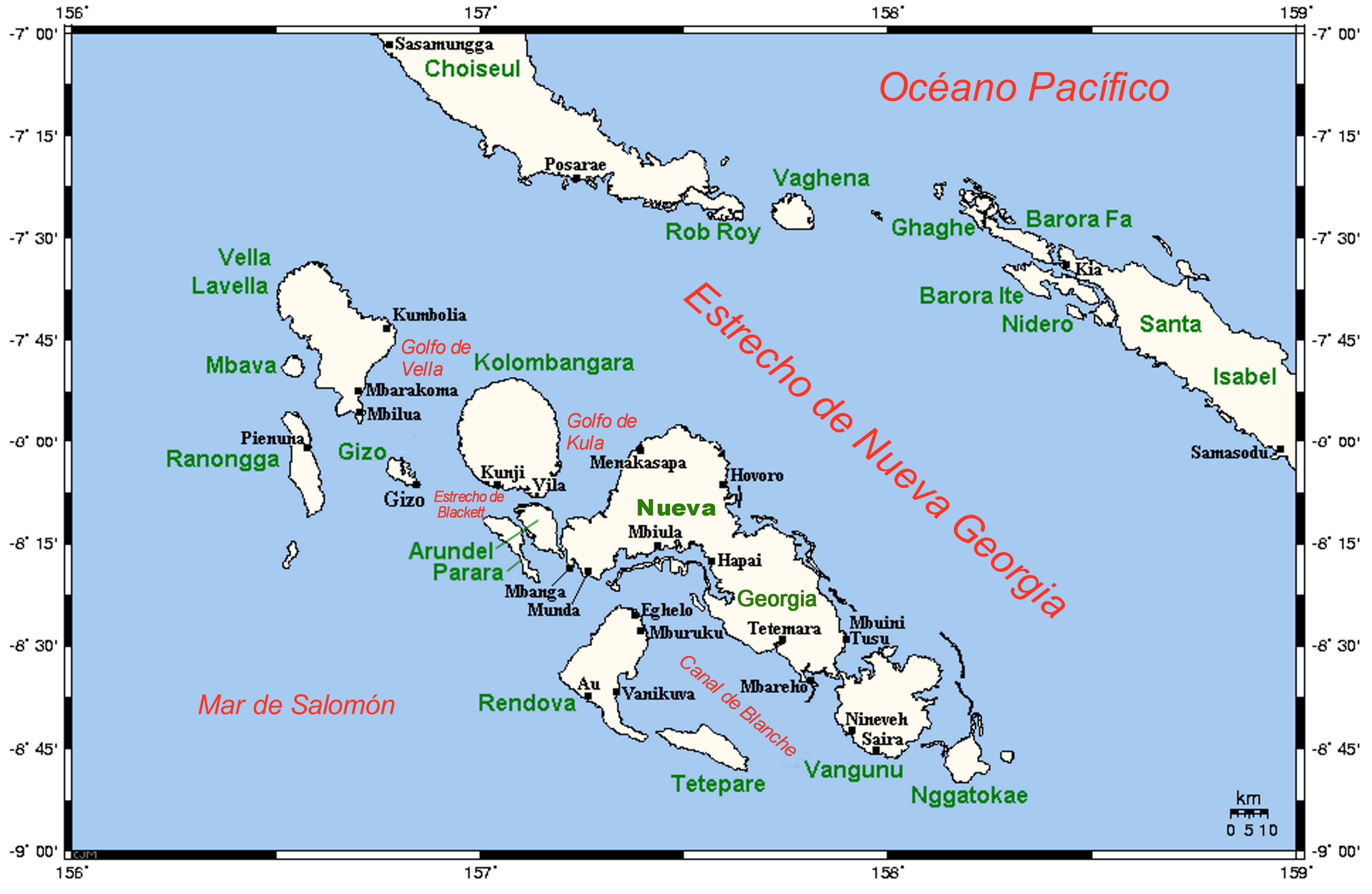 Mapa de las Islas Salomón